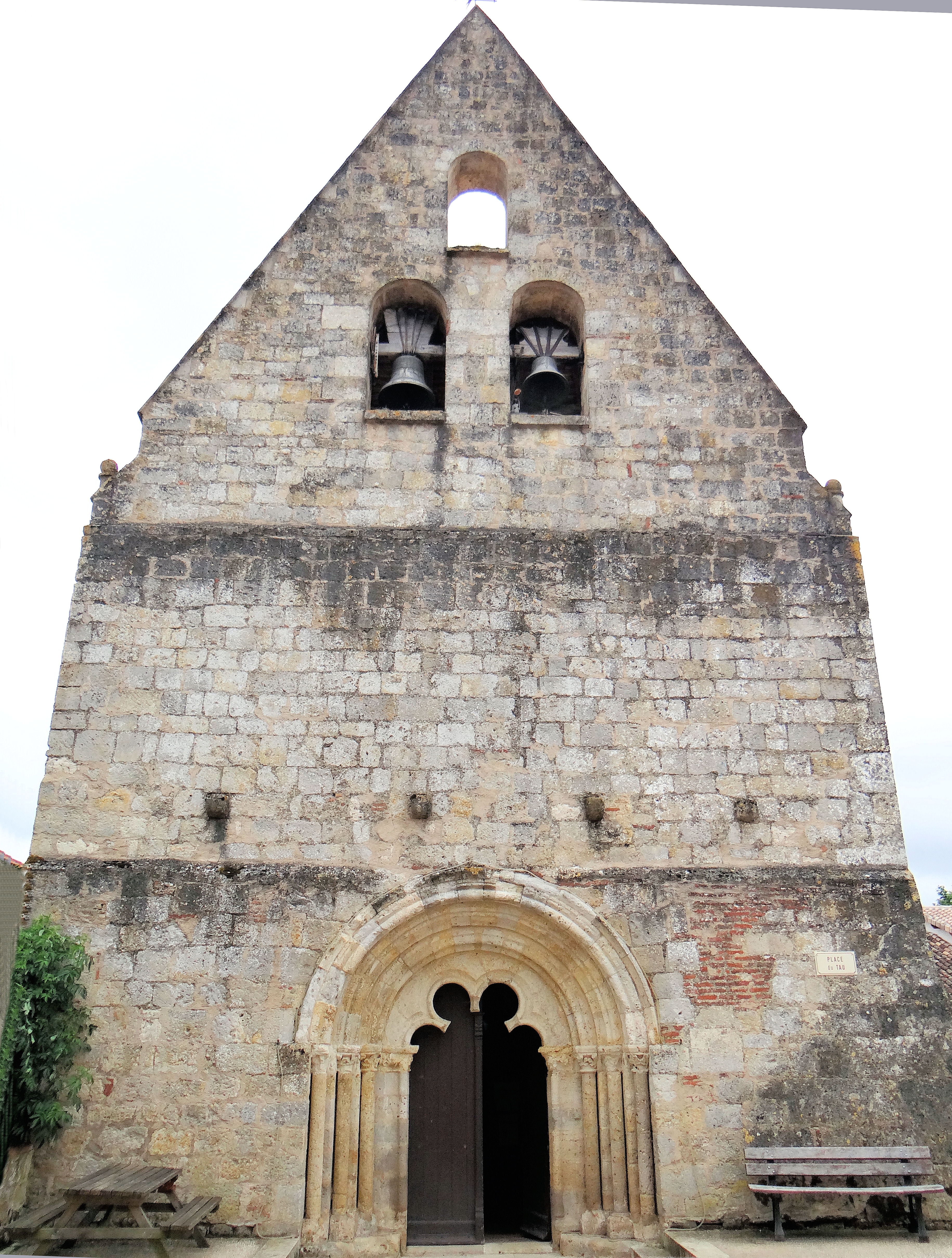 Saint-Antoine (Gers) - Église Saint-Antoine - Façade et portail place du Tau